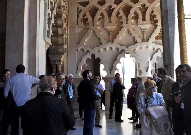 Kongresanoj dum vizito al la palaco Aljafería de Zaragoza